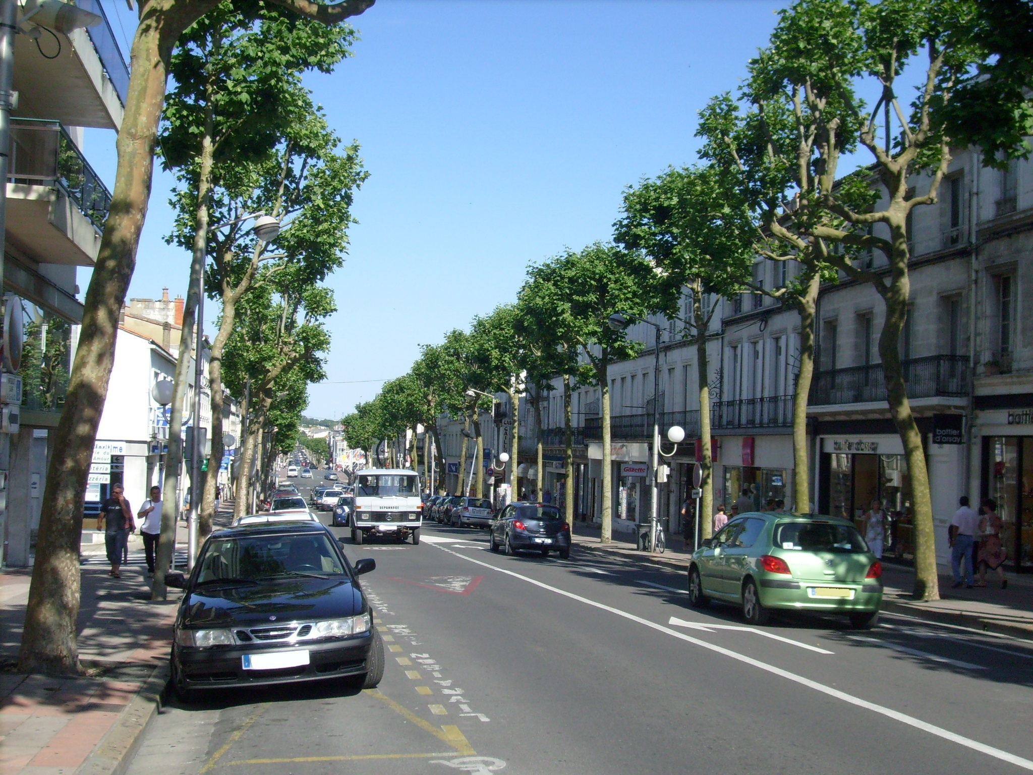 Cours National, Saintes